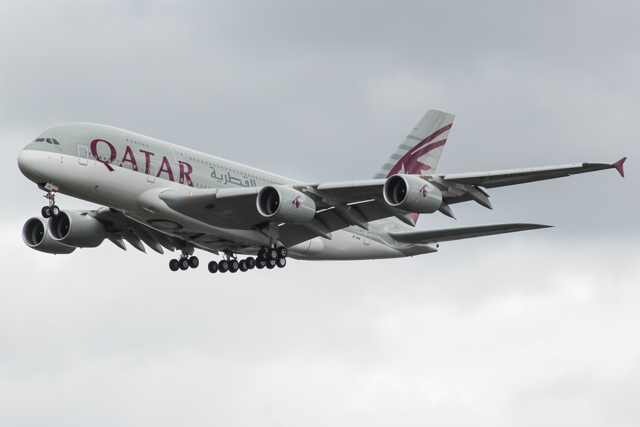 A7-APA A380 Qatar